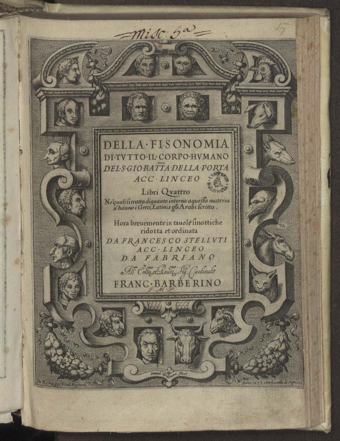 Giambattista della Porta, Della Fisionomia: title page